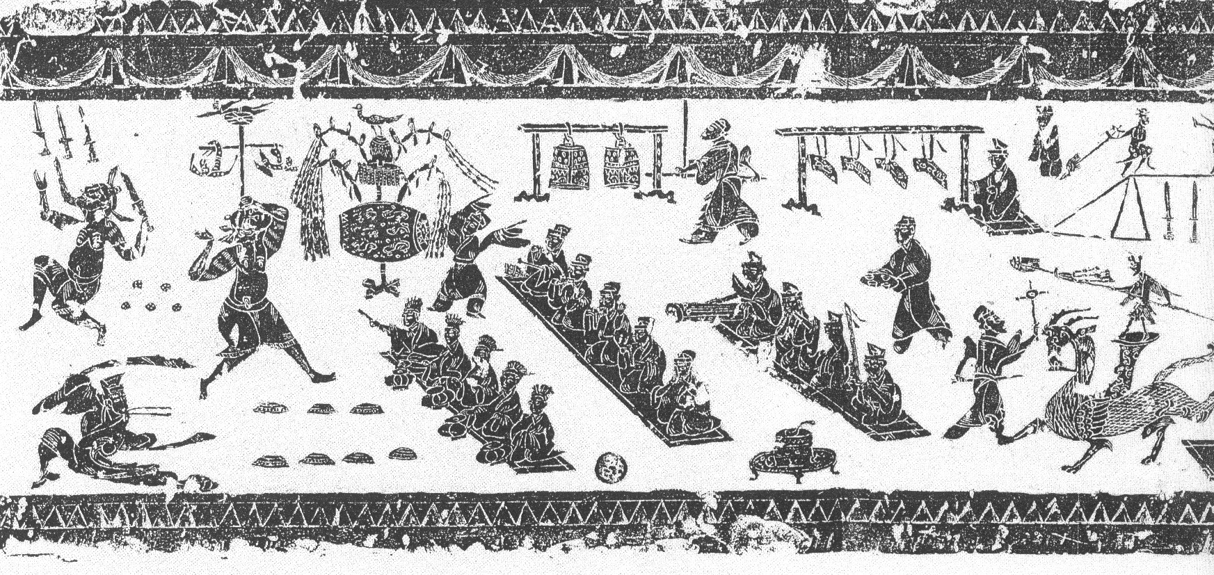 Jongleur aux épées, bateleur. Estampage de pierre gravée de la dynastie Han (voir Jacques Pimpaneau, "Chine. Littérature populaire", Philippe Picquier, 1991, p. 255)